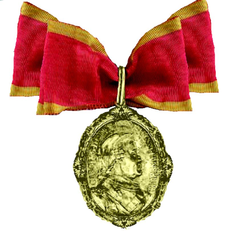 ereteken ingesteld in 1908